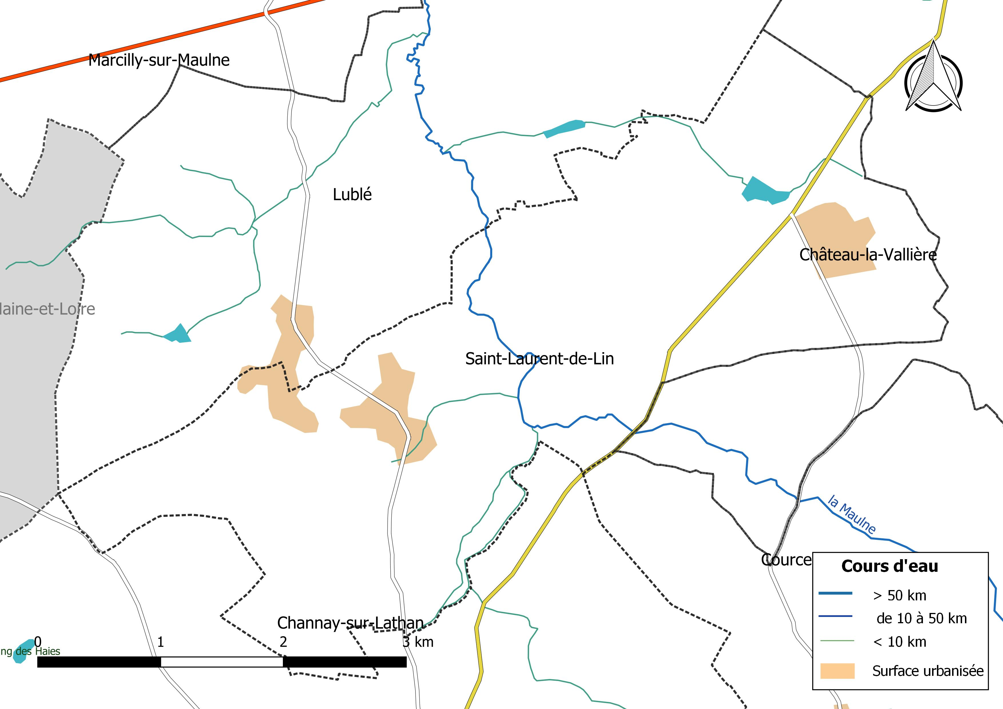 Carte du réseau hydrographique de la commune de Saint-Laurent-de-Lin (France).